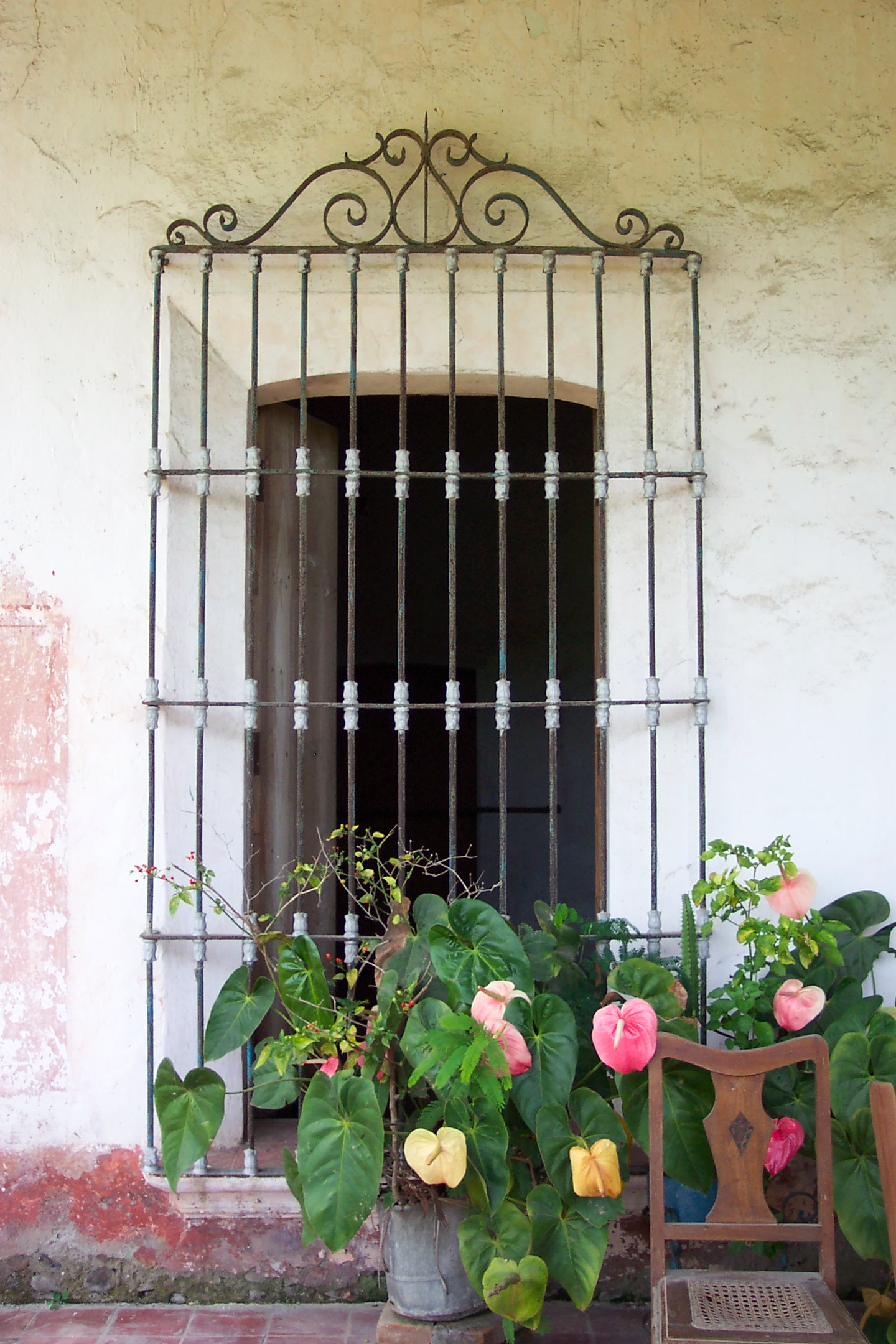 Finestra di Casa Lagunes (Angostillo)